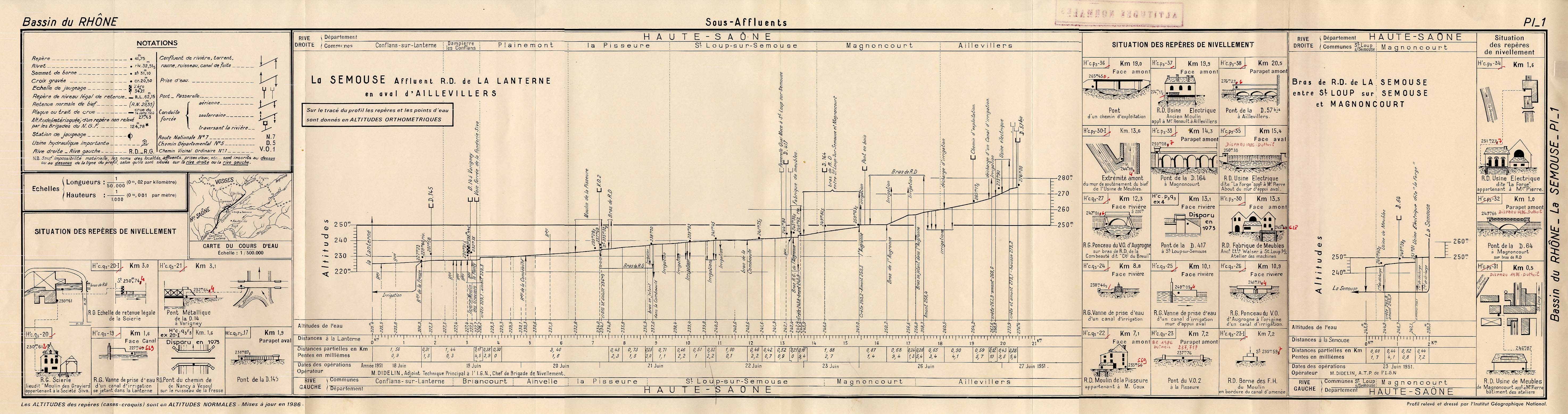 Profil altimètrique de la rivière Semouse entre la commune de Aillevillers (70) et sa confluence avec La Lanterne. Levé par M. Didelin, chef de Brigade nivellement à l'IGN